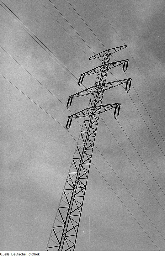 Original image description from the Deutsche Fotothek Bild Vierebenenmast